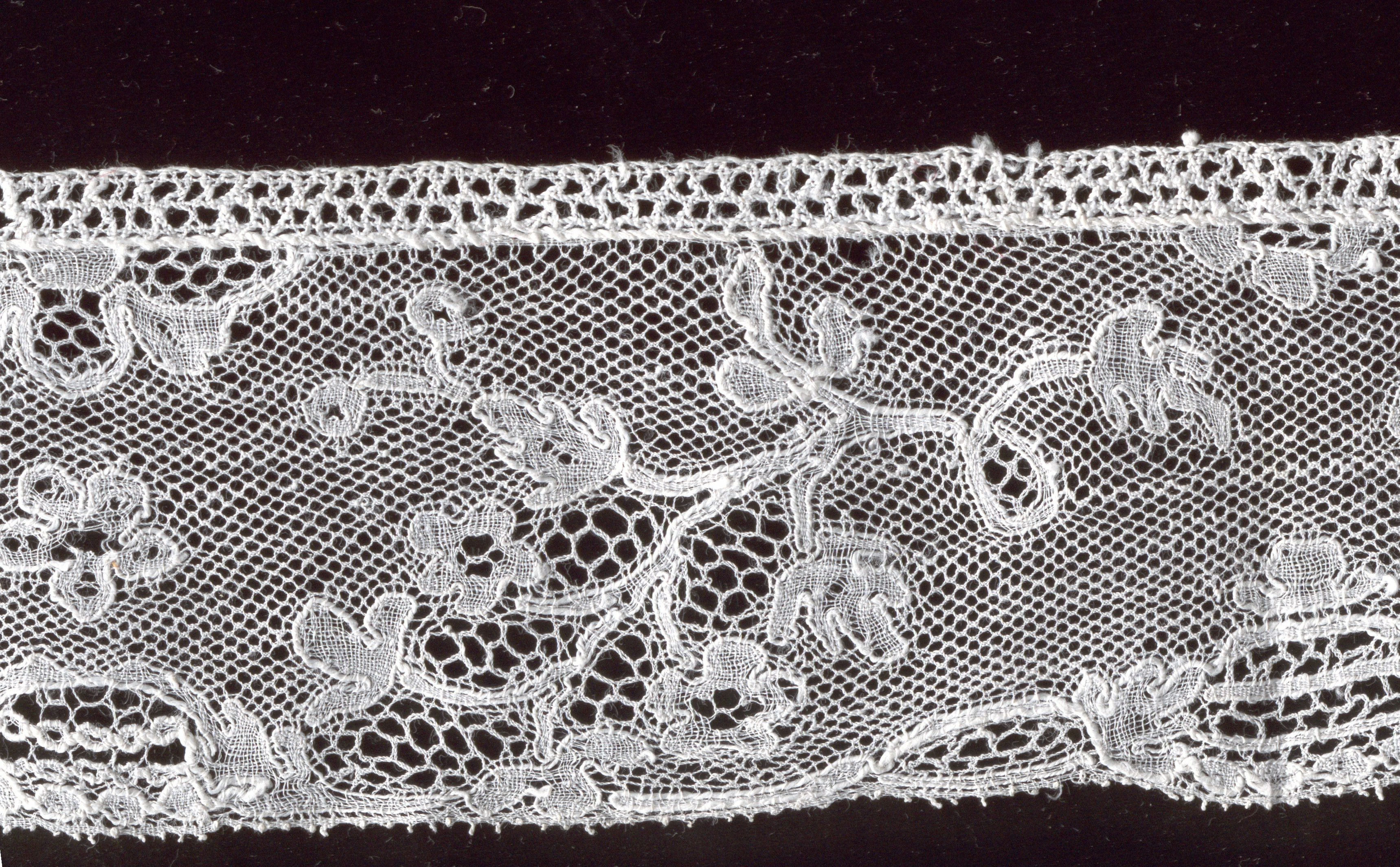 18de eeuwse Mechelse kant, detail. Uitvergroot scan, werkelijke oppervlakte 4.75 cm x 22 cm. Voor info; Carolus.